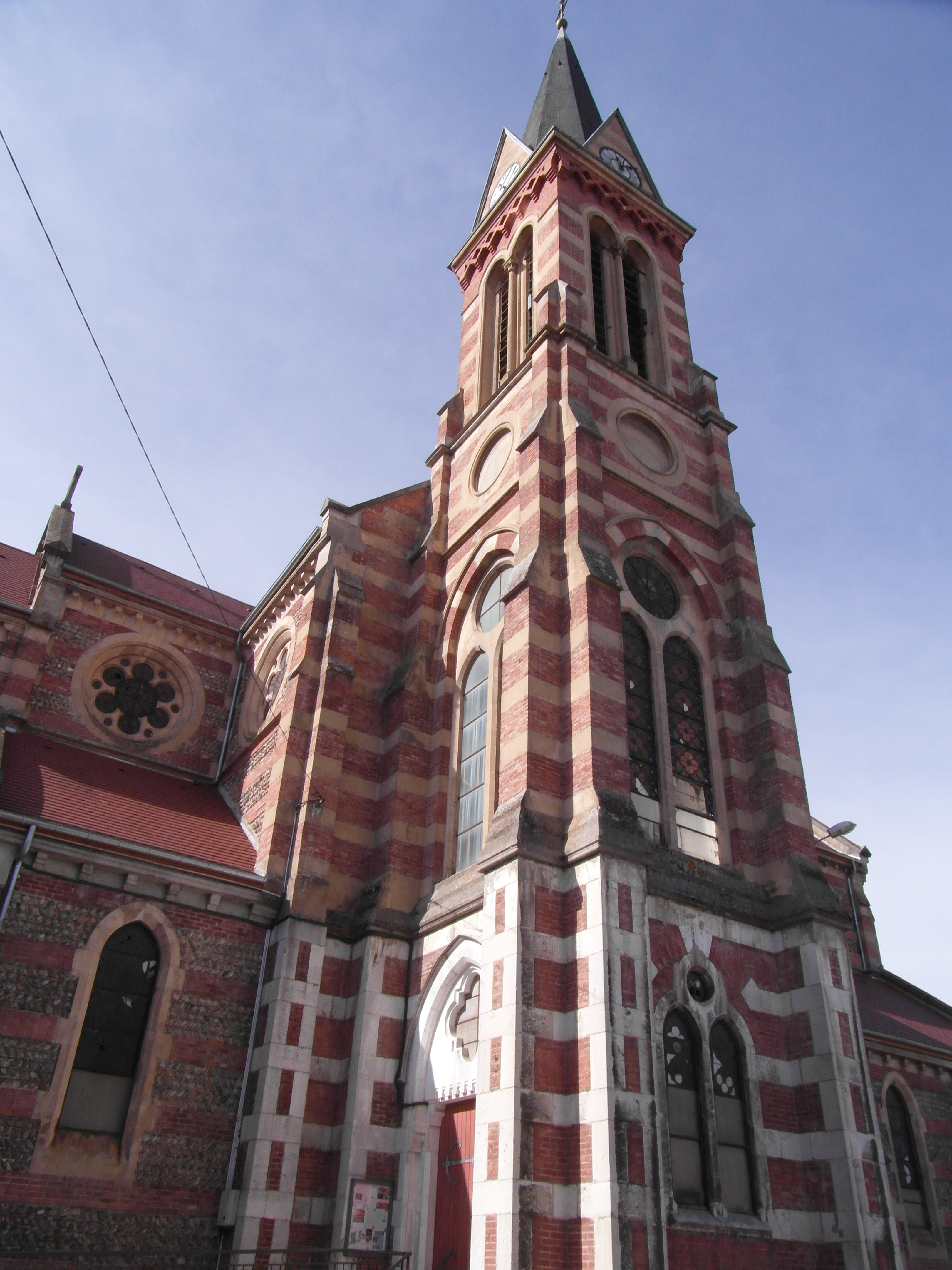 Église d'Izeaux en mars 2019